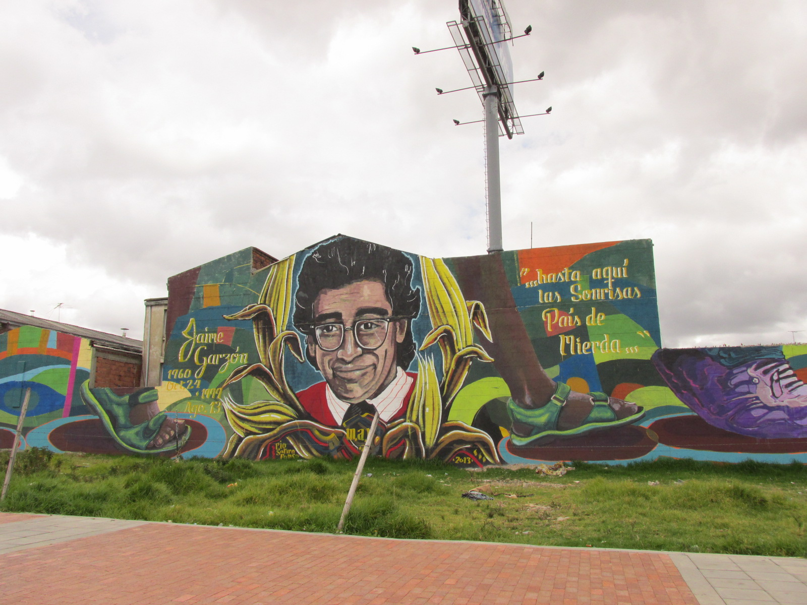 Ilustración de Jaime Garzon en la Avenida del Dorada o Calle 26.